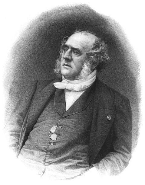 La Rochejaquelein